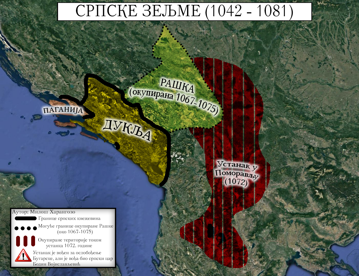 Српске земље у 11. веку.